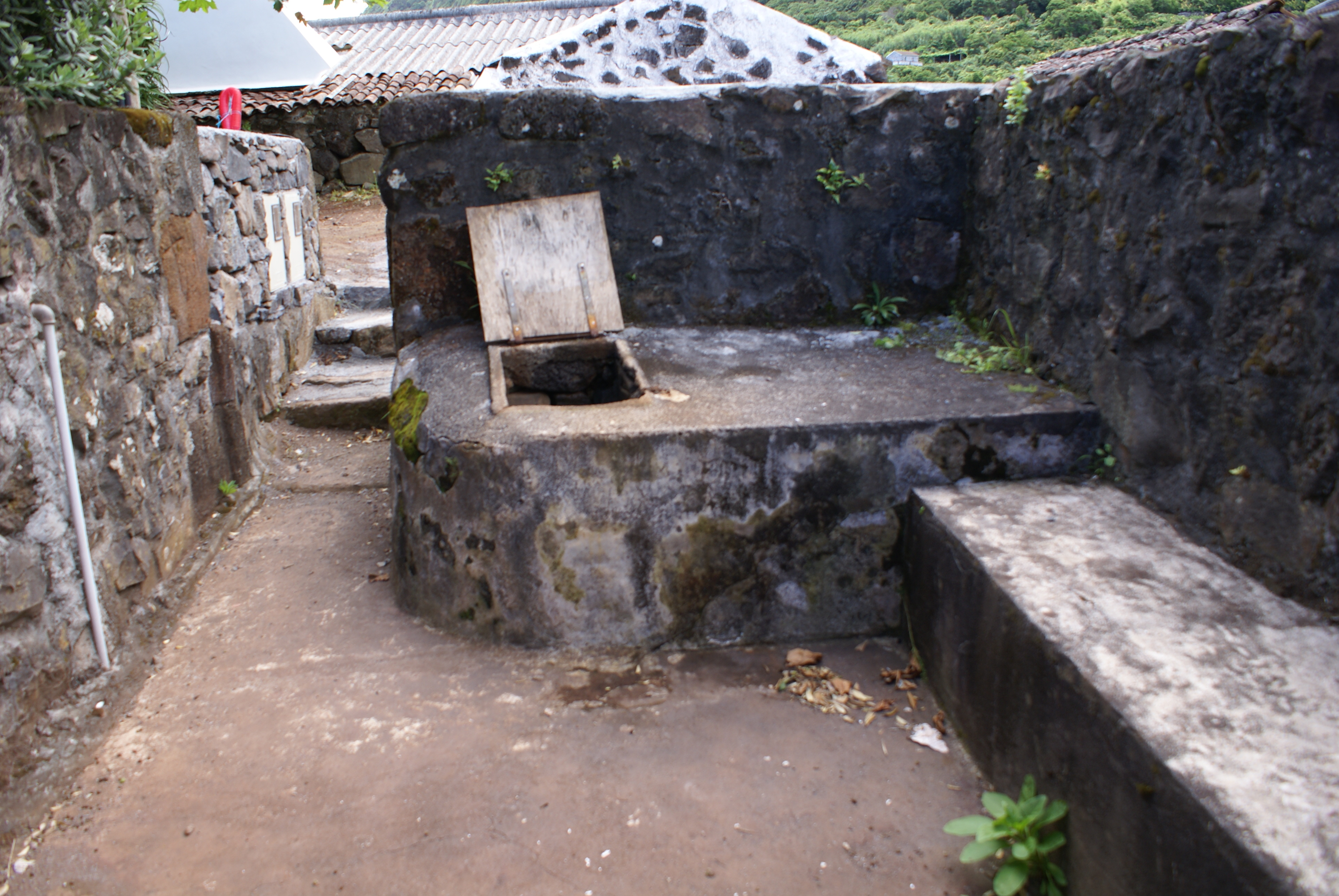 Poço de Baixa mar, Fajã dos Cubres, Calheta, ilha de São Jorge, Açores